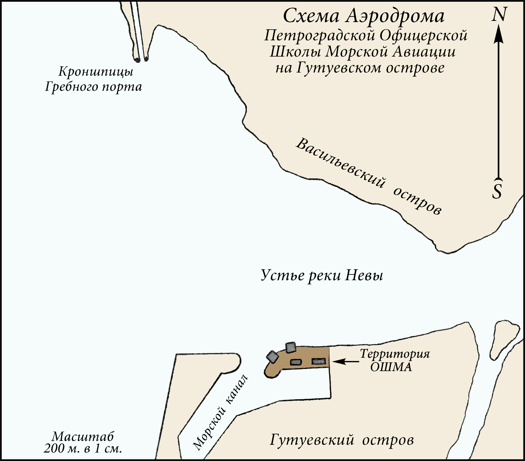 План аэродрома ОШМА на Гутуевском острове в Петрограде. В основу плана положен рисунок авиаконструктора Д. П. Григоровича, сделанный им по памяти в период 1925-1938 гг. Внесены отдельные исправления.